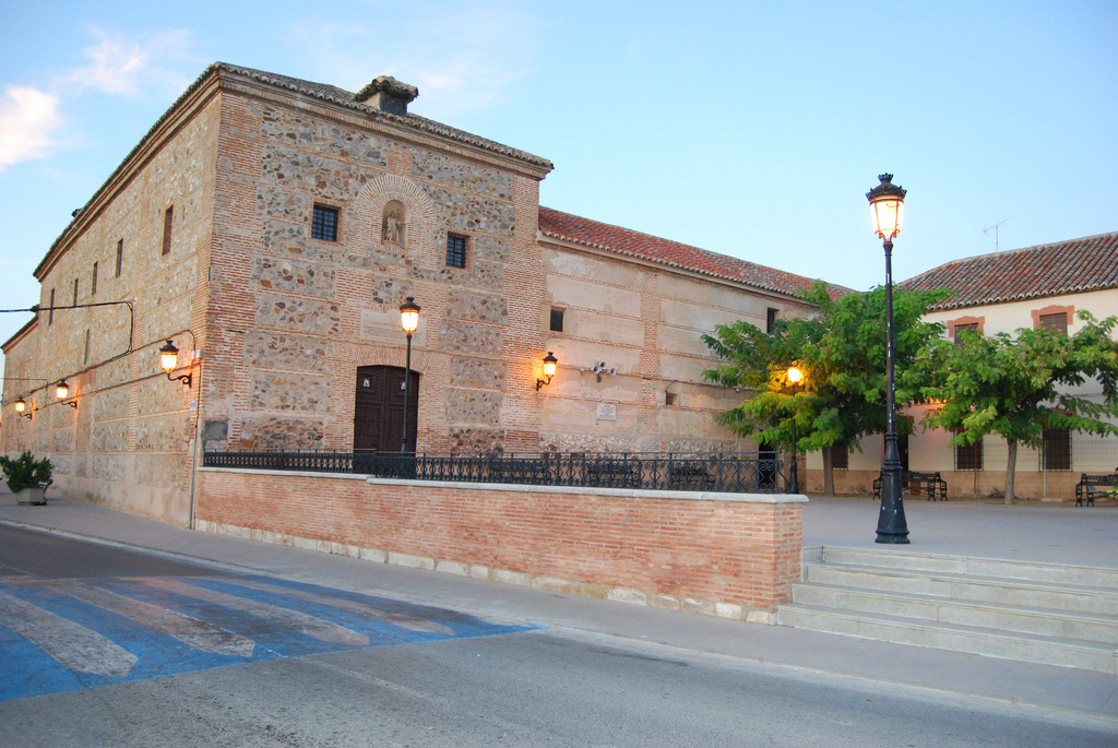 Iglesia de San José construida por Santa Teresa de Jesús